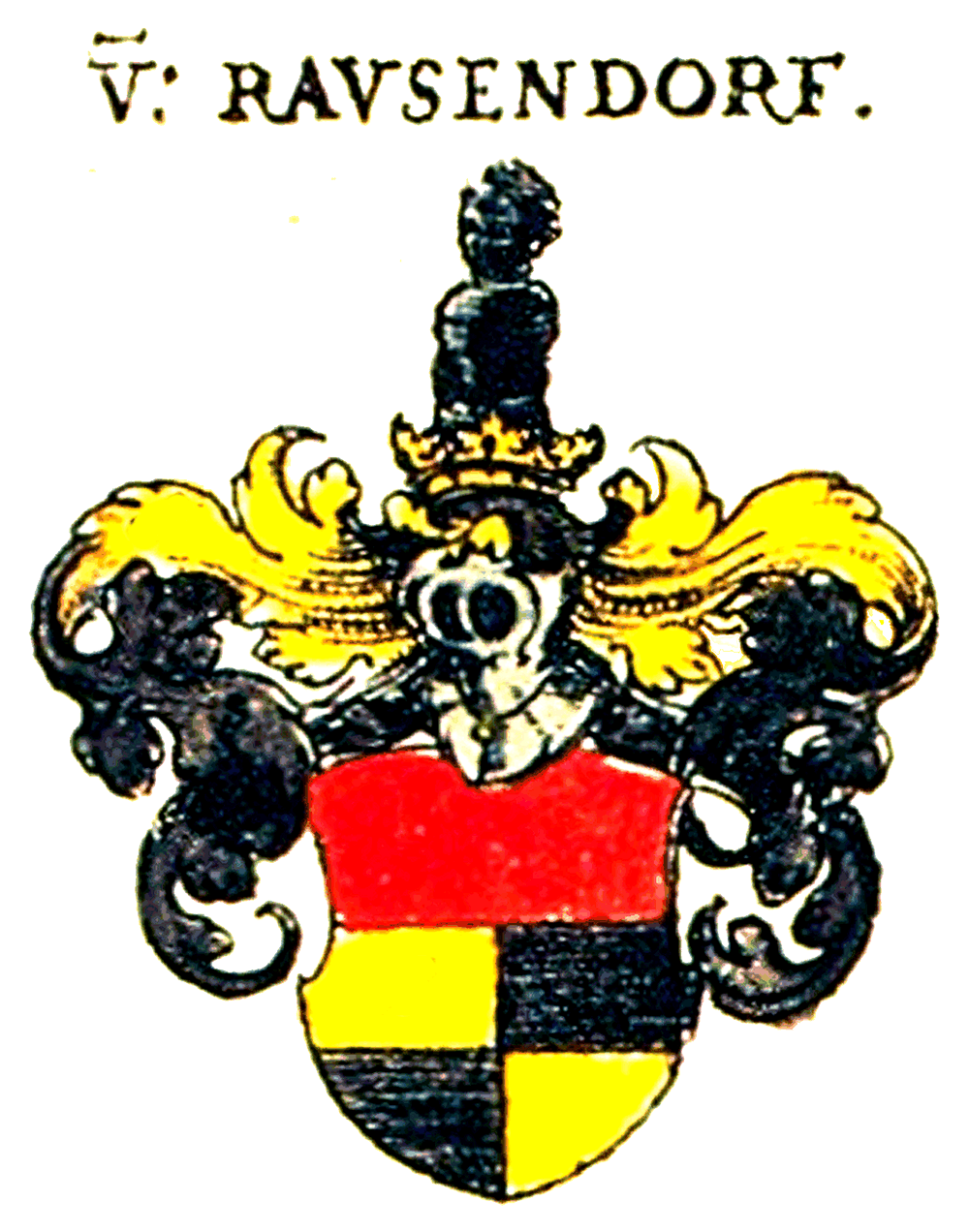 Wappen derer von Ravsendorf (Raussendorff)